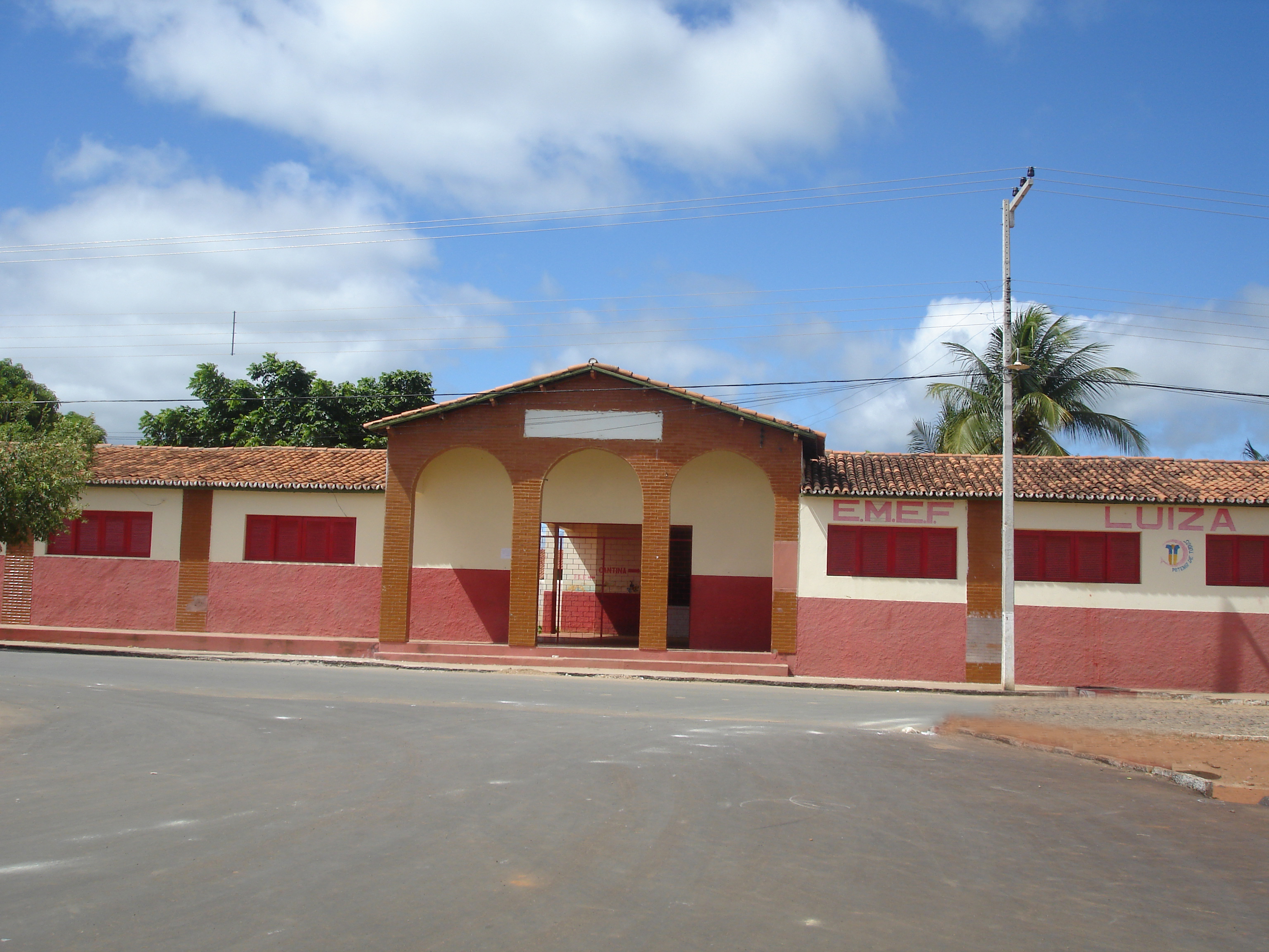 Colégio Luiza Mendes - Potengi, Ceará, Brasil